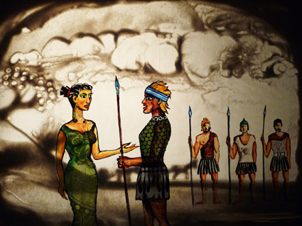 Szenenbild aus dem Stück "Starke Frauen"